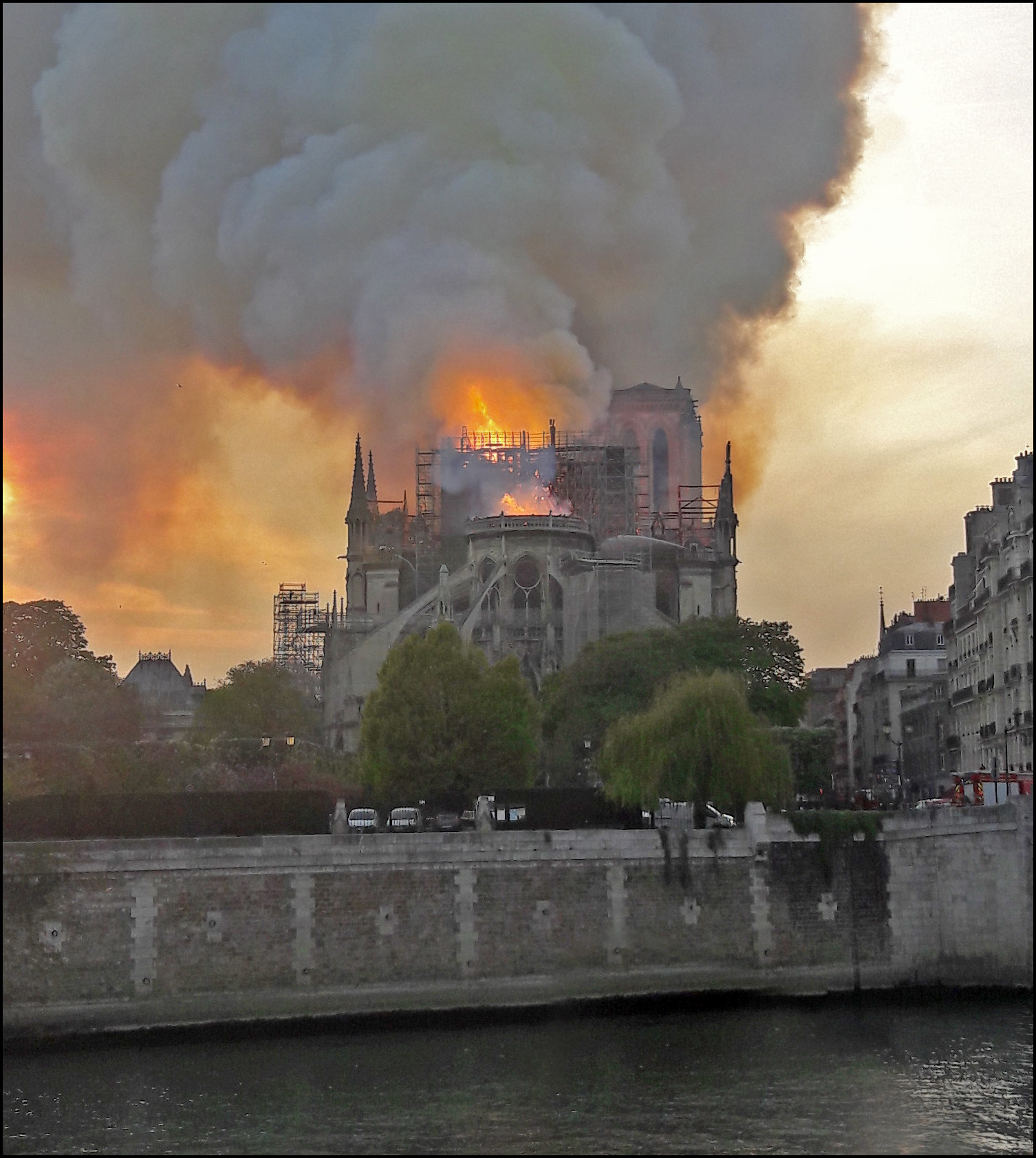 Incendie de la charpente de Notre Dame